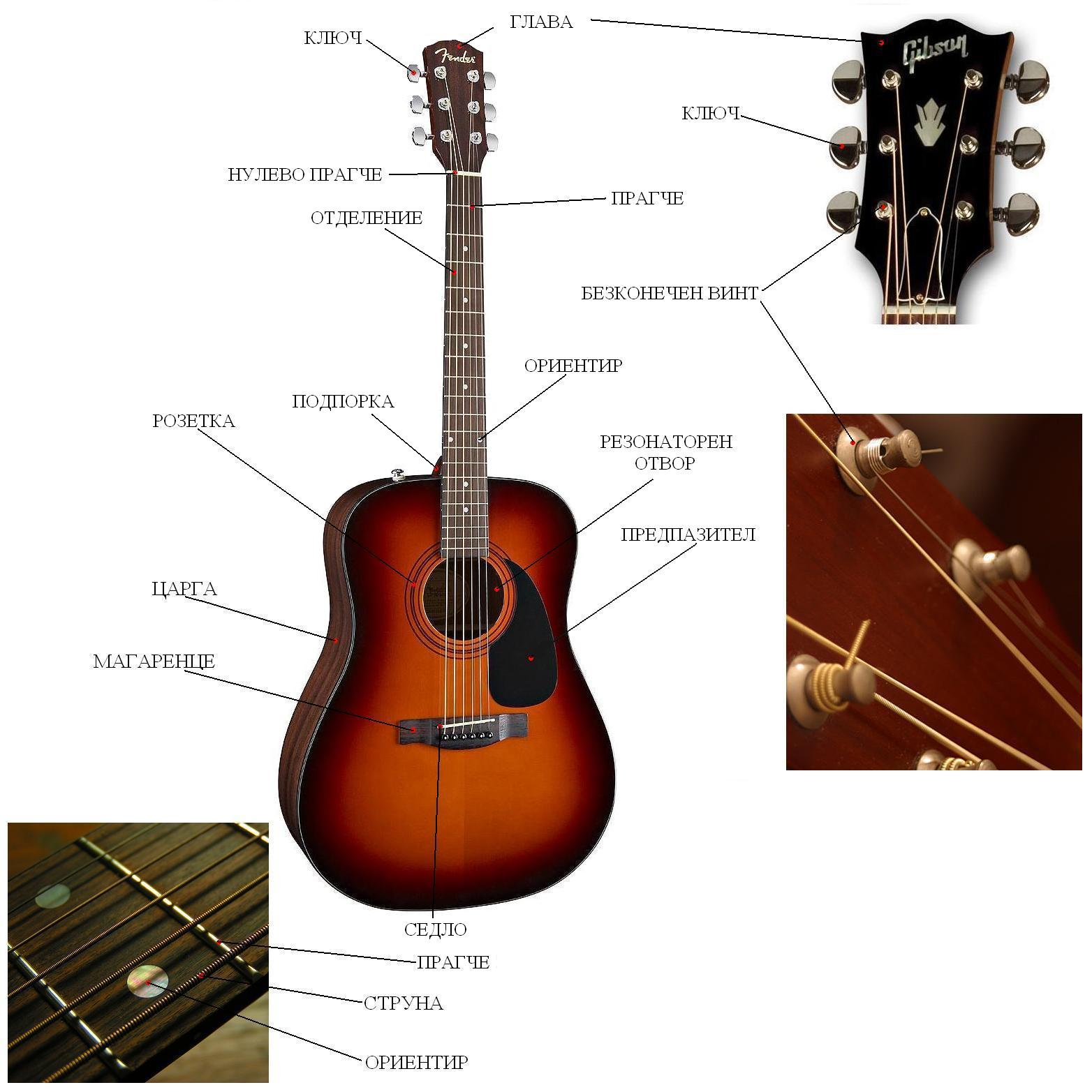 Файлът представлява схема на устройството на примерна акустична китара с метални струни. Схемата дава информация за отделните части на инструмента и техните наименования съответно на български. Използван е достатъчно голям шрифт, за да може думите да са разбираеми и четливи.